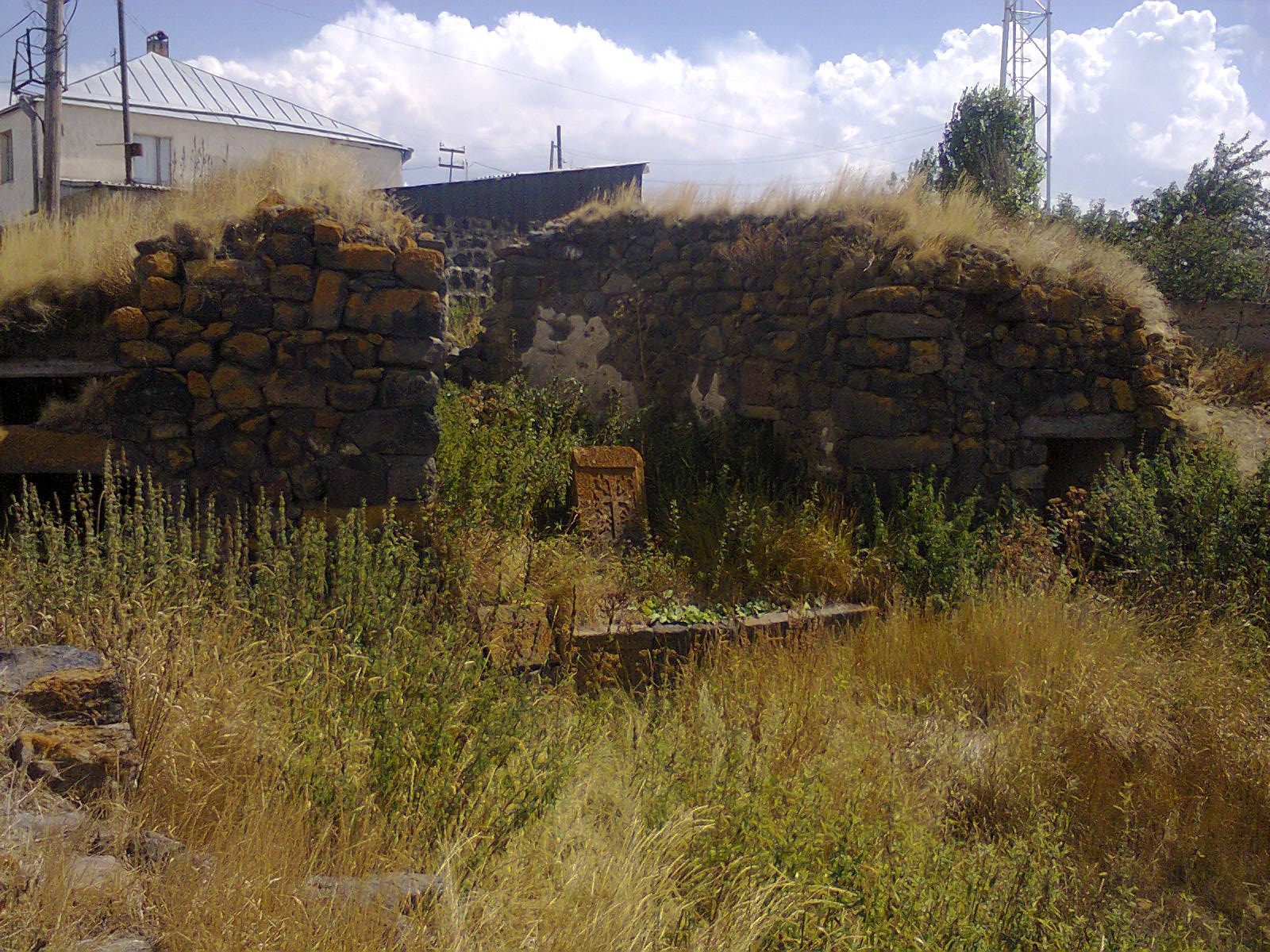 ՍԲ.Ստեփանոս կիսավեր եկեղեցին